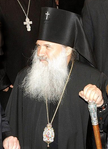 Викентий, архиепископ Екатеринбургский и Верхотурский.